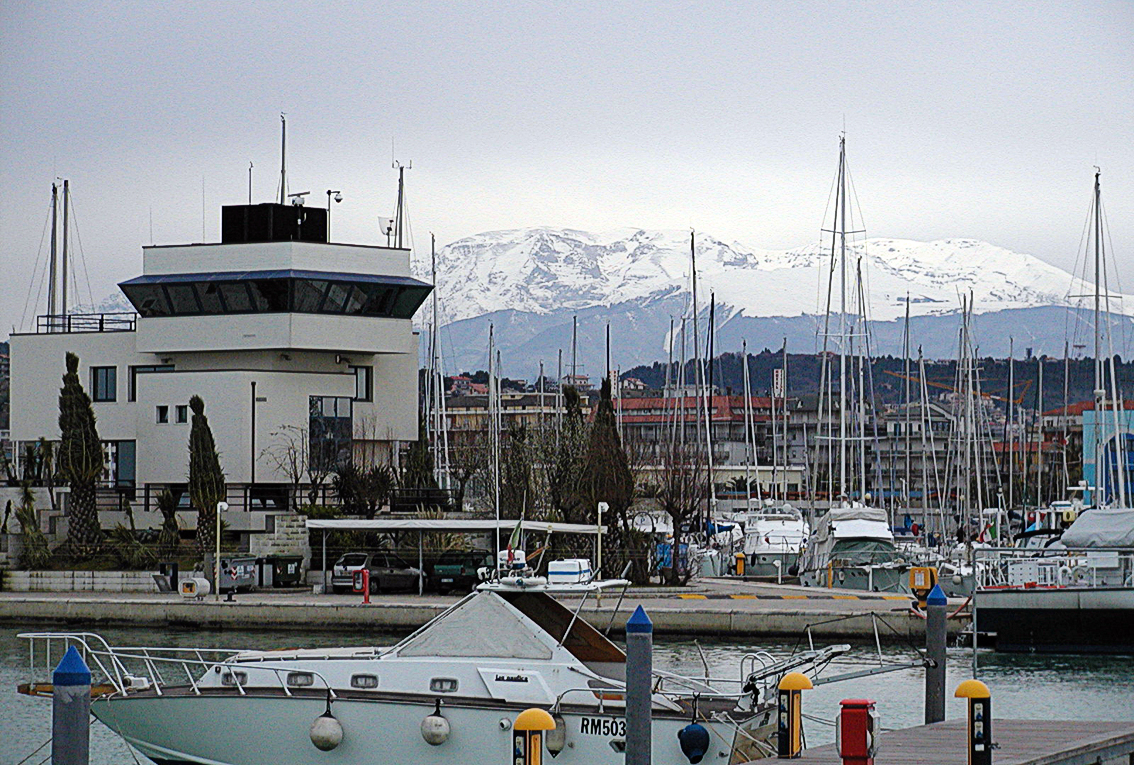 Der Jachthafen im Winter, +16°C schneebedeckte Berge in 60 Km -8°C